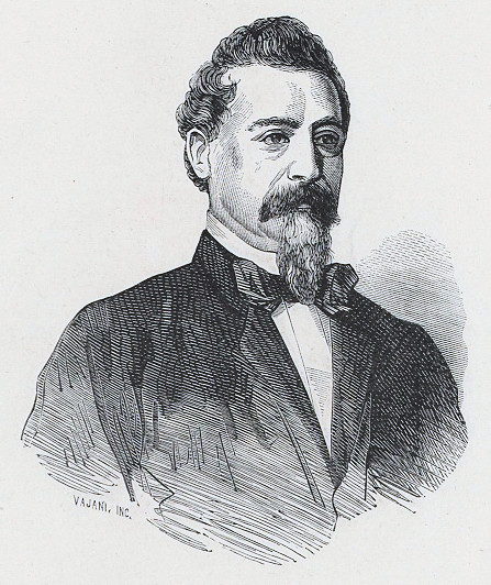 Ritratto di Candido Augusto Vecchi